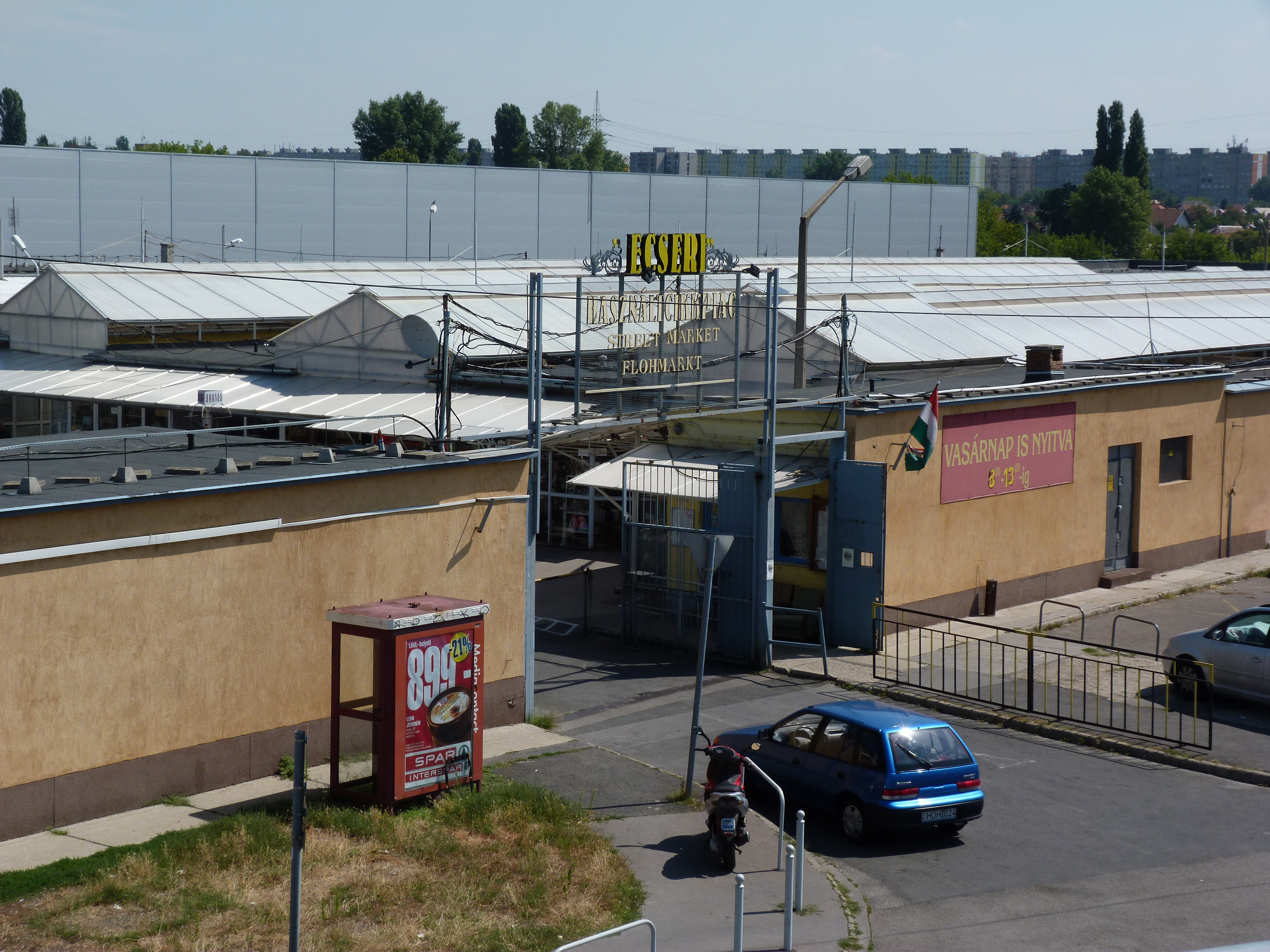 A felvétel 2013. augusztus 1 -én, csütörtökön készült. Budapest. Ecseri Használtcikk Piac (Nagykörösi út). ©© Published under Creative Commons in the Metapolisz DVD line. All of the photos and vids in the Metapolisz DVD line are under Creative Commons and can be used even for commercial – for profit – purposes. Recommended Citation Derzsi Elekes Andor: Metapolisz DVD line